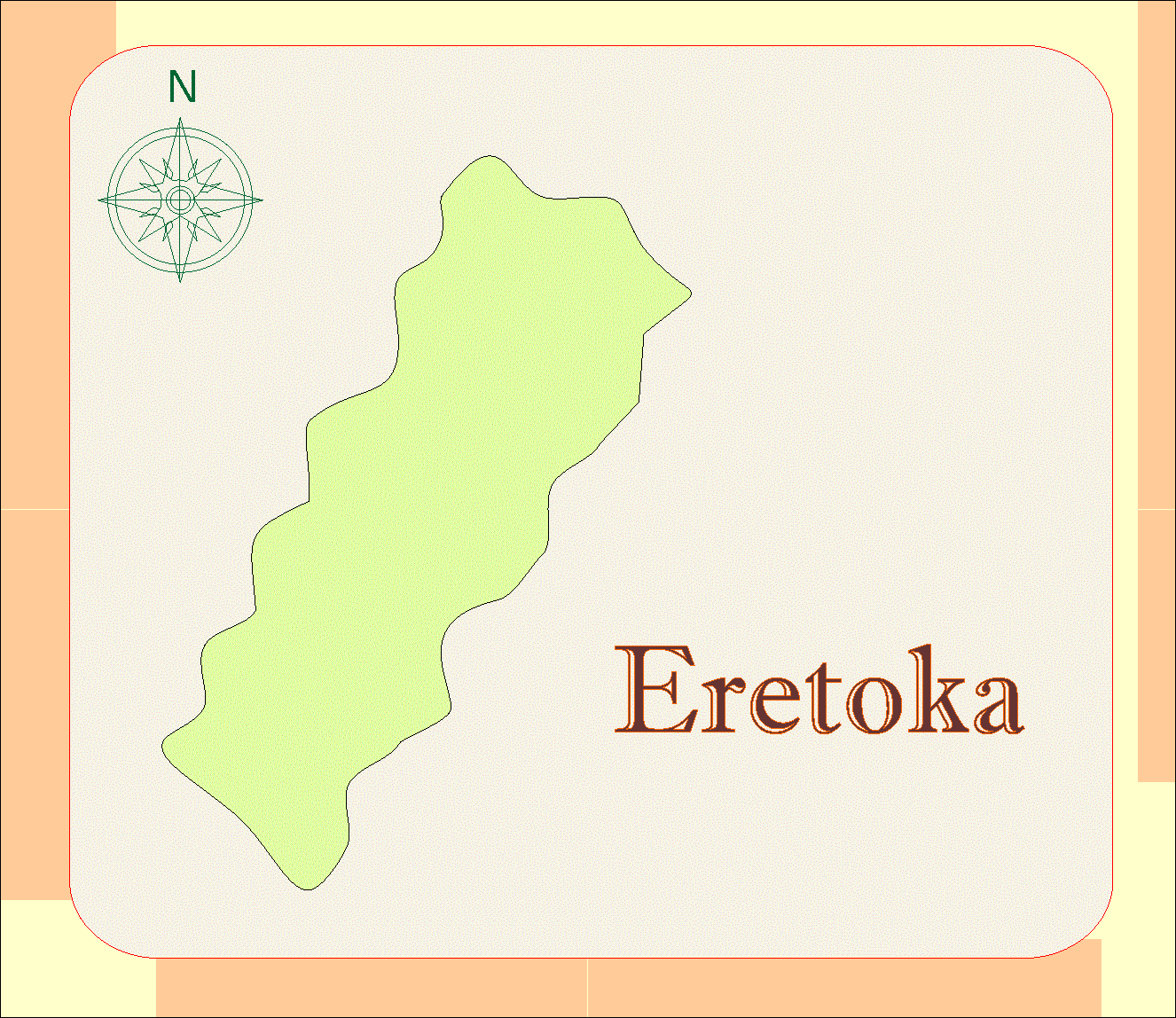 Автор: Галина Йорданова Summary Карта на остров Емао.